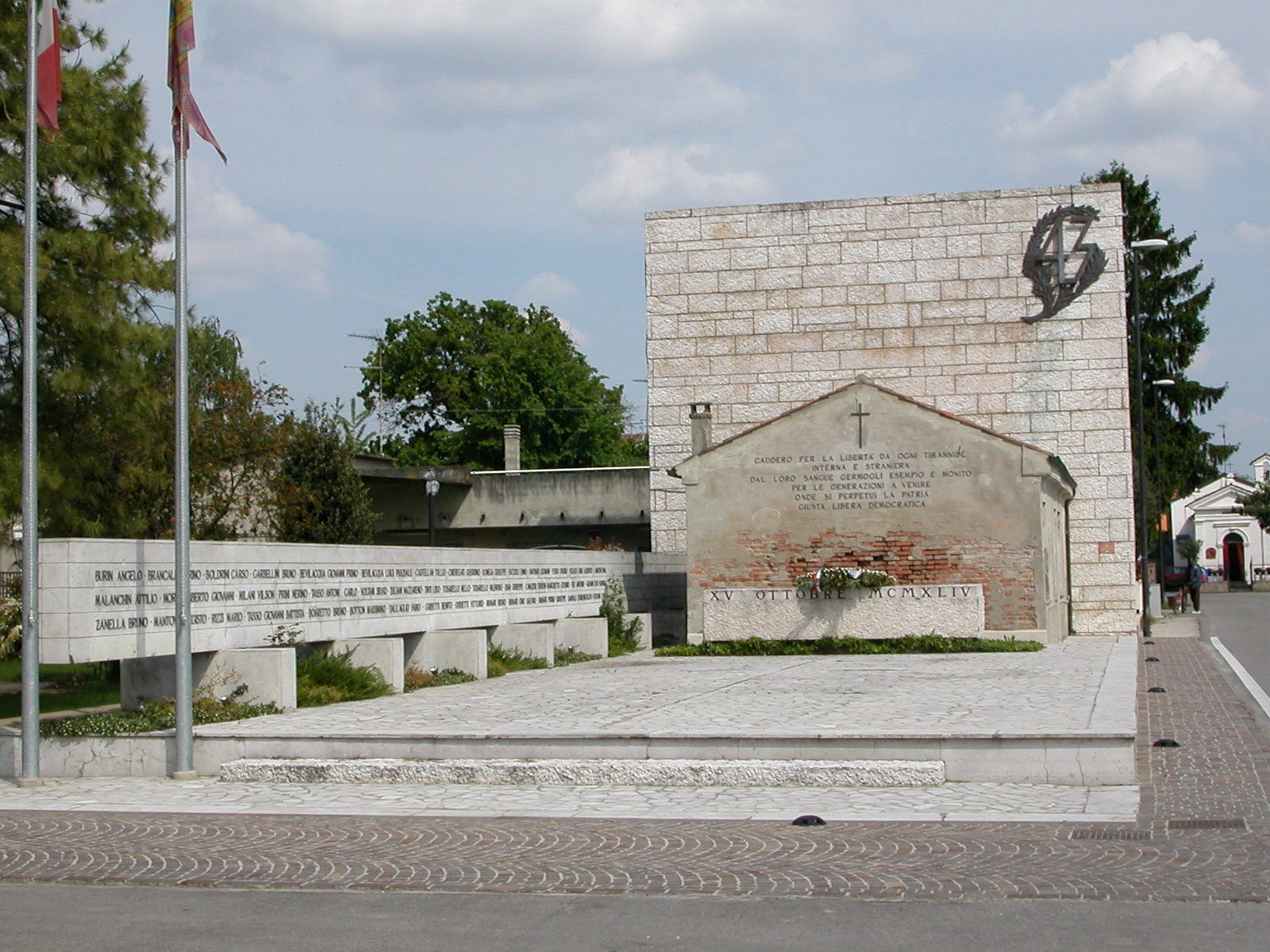 Monumento ai caduti di Villamarzana, provincia di Rovigo.